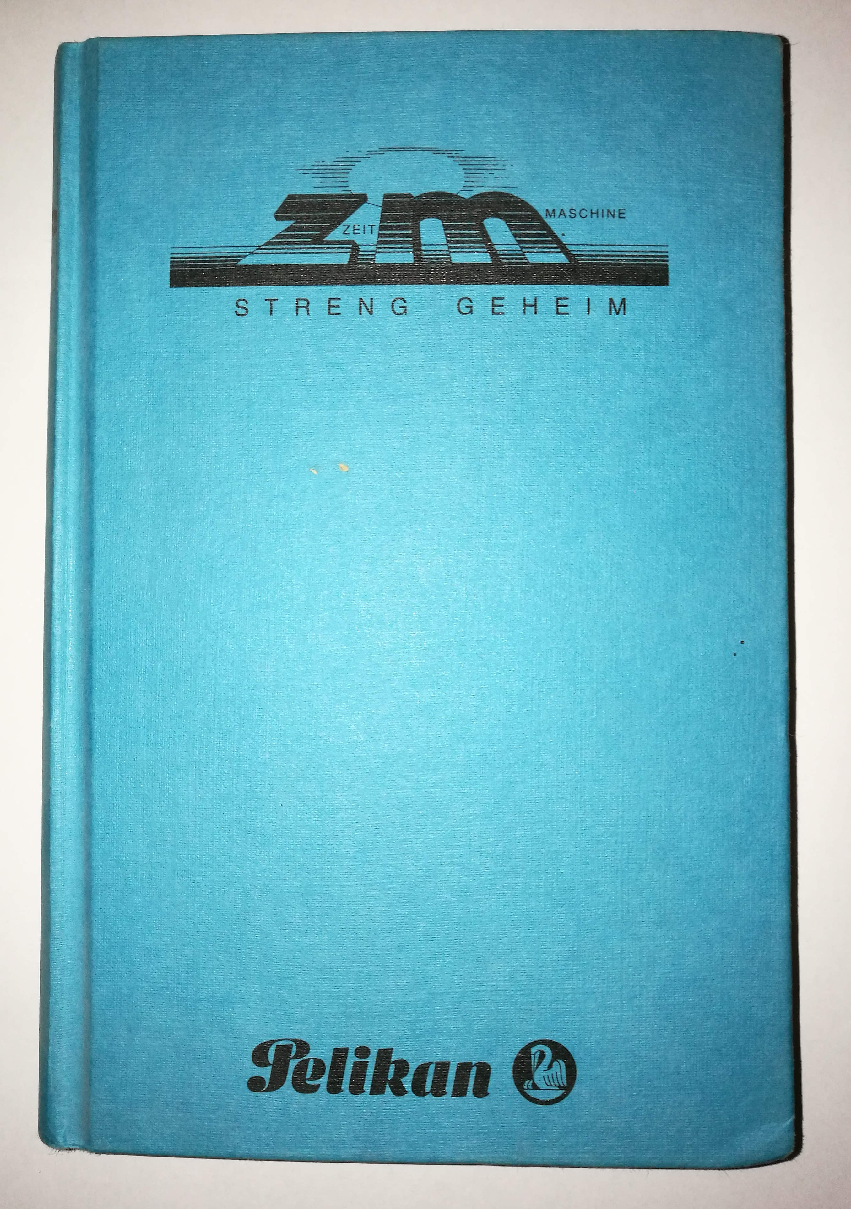 Ein Buch der Zweiten Serie aus den Neunzigern